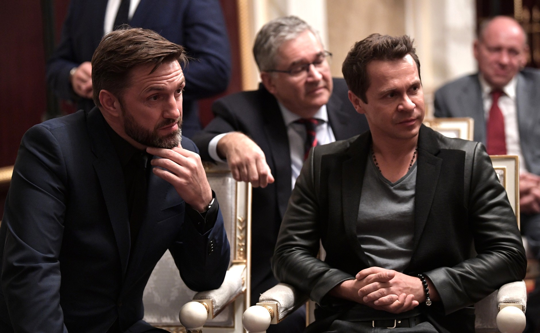 Встреча Президента России Владимира Путина со съёмочной группой фильма «Салют-7». Исполнители главных ролей в фильме «Салют-7» Владимир Вдовиченков (слева) и Павел Деревянко.